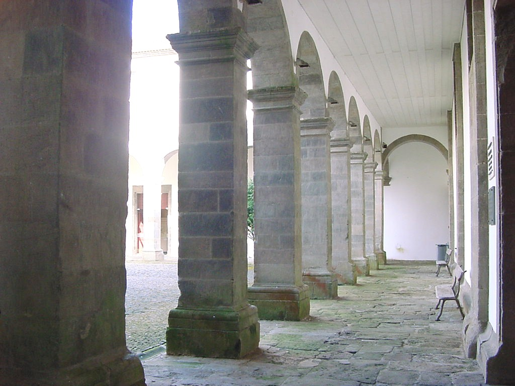 Igreja de São Francisco, Convento de São Francisco, Angra do Heroísmo, ilha Terceira, Açores, Portugal.